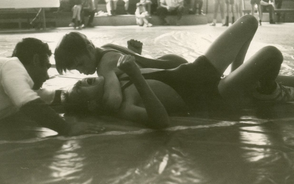 Gerhard Sattel (oben) - Landesmeister 1970